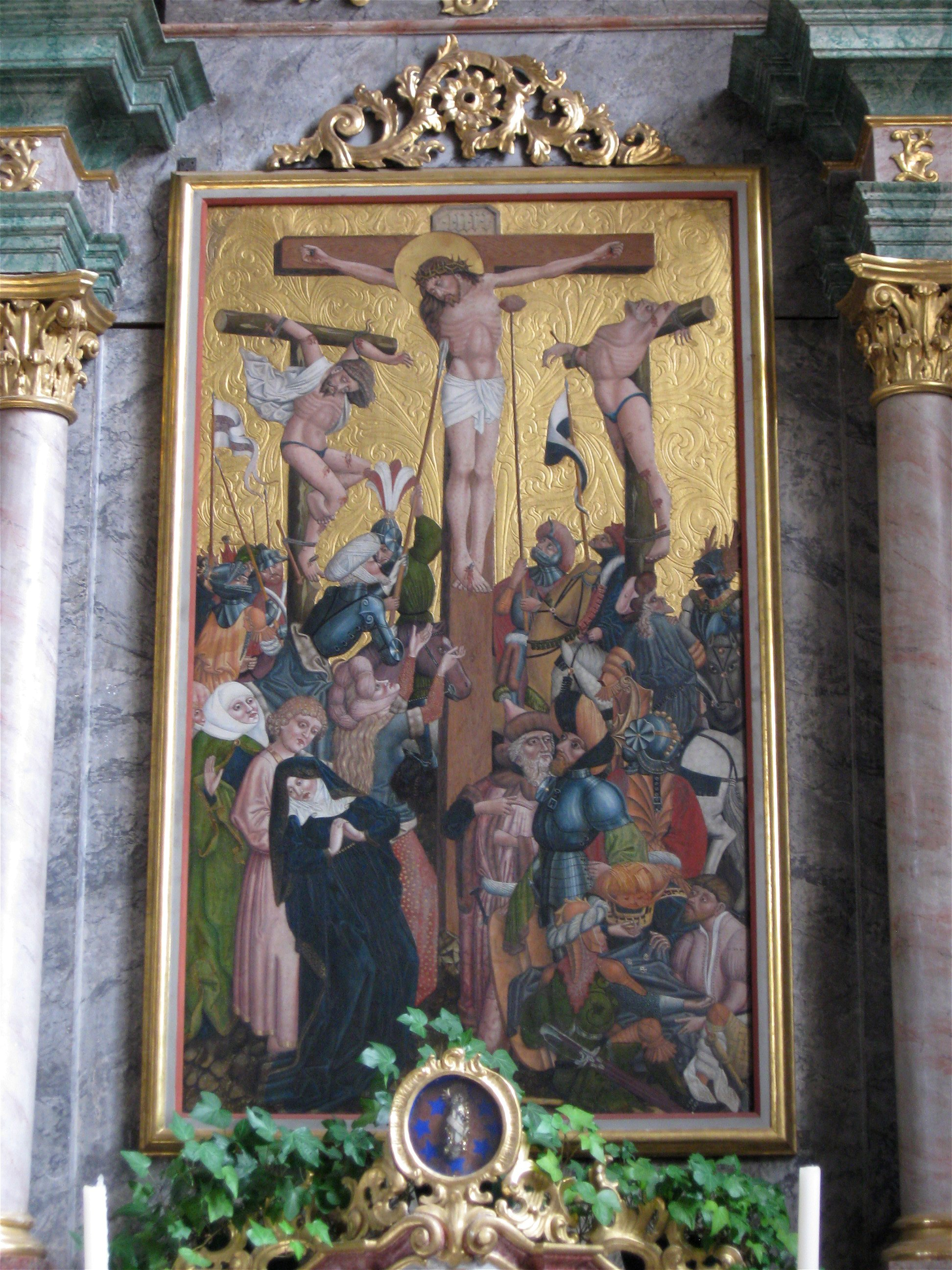 Kath. Pfarrkirche Mariä Himmelfahrt, Chor 1513 geweiht, Turm gleichzeitig; Langhaus mit Vorhalle 1923/24; mit Ausstattung; Friedhof mit z. T. alter Ummauerung und schmiedeeisernen Grabkreuzen des 18./19. Jh.; Seitenaltar